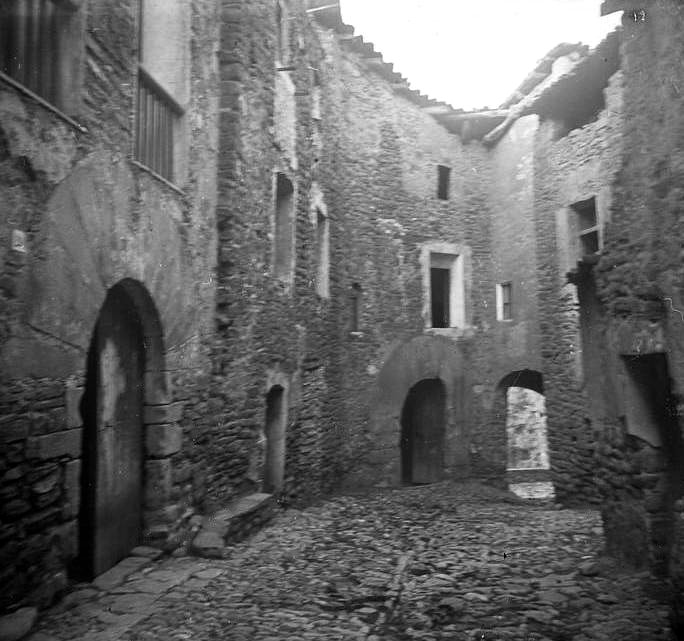 Carrer i portal de Palau de Noguera. Josep Salvany i Blanch (1920)